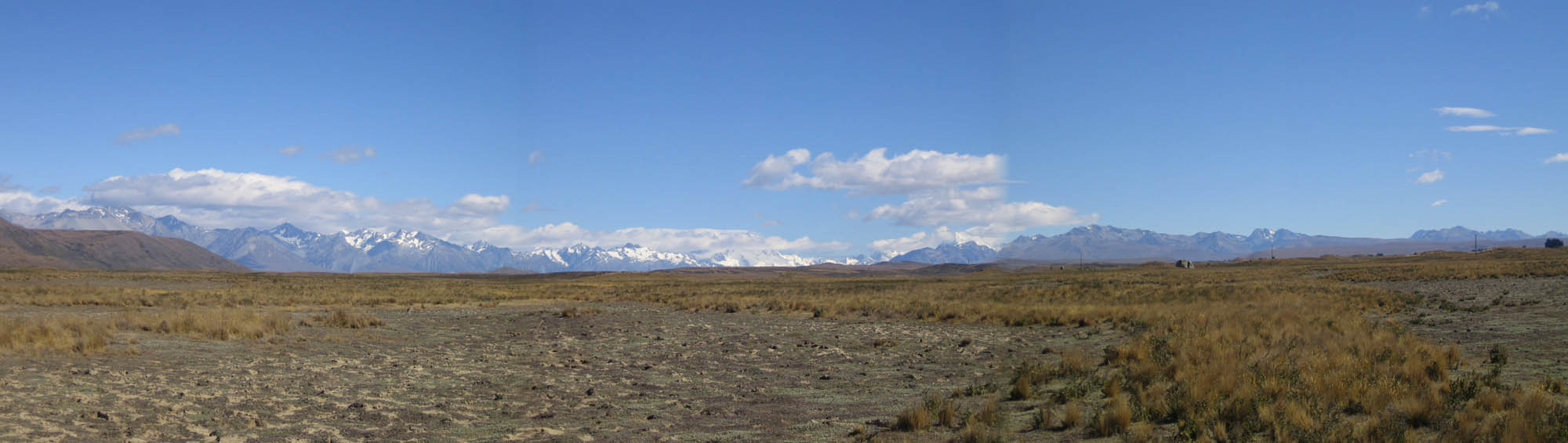 Photo panoramique des Alpes du Sud en Nouvelle-Zélande. (Photo personnel 2006) Utilisateur:FRED